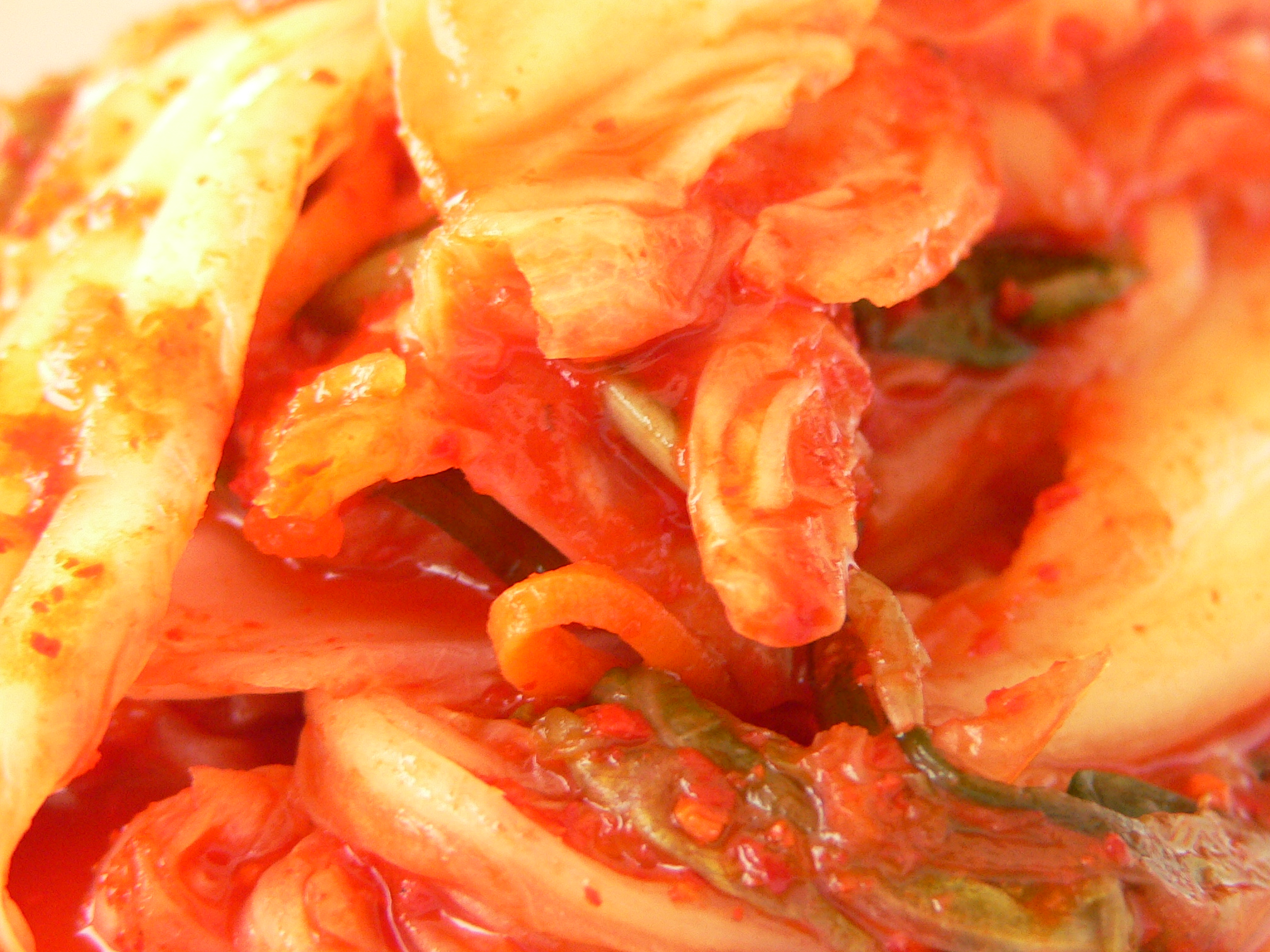 Kimchi, Korean side dish